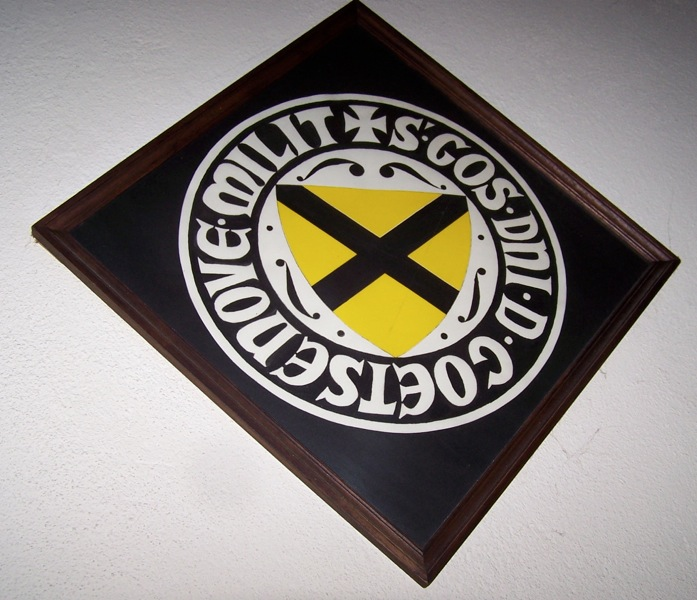 Sceau du seigneur Gosuin van Goetsenhoven (XIIIe et XIVe siècles)